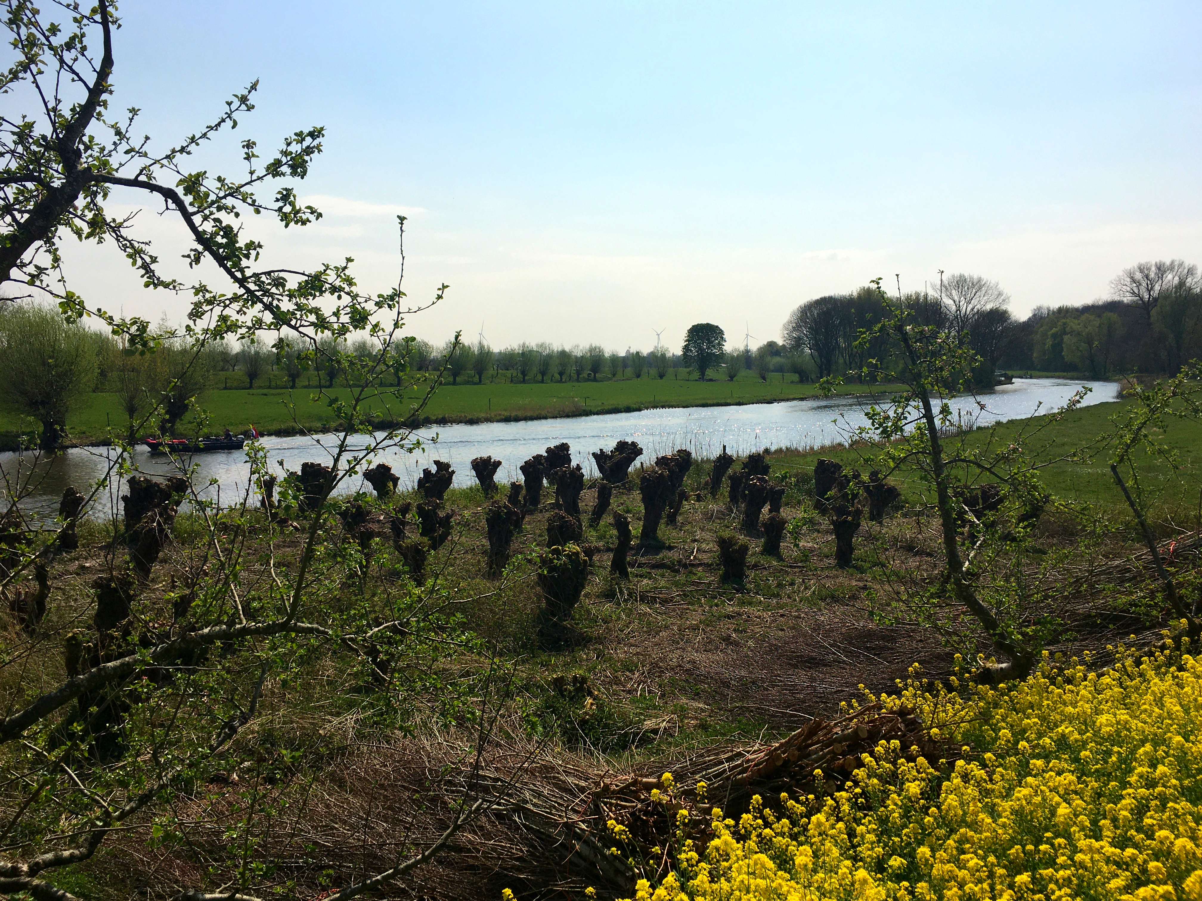 Typical Dutch riverscape of the Linge river near Beesd (Betuwe, Netherlands)